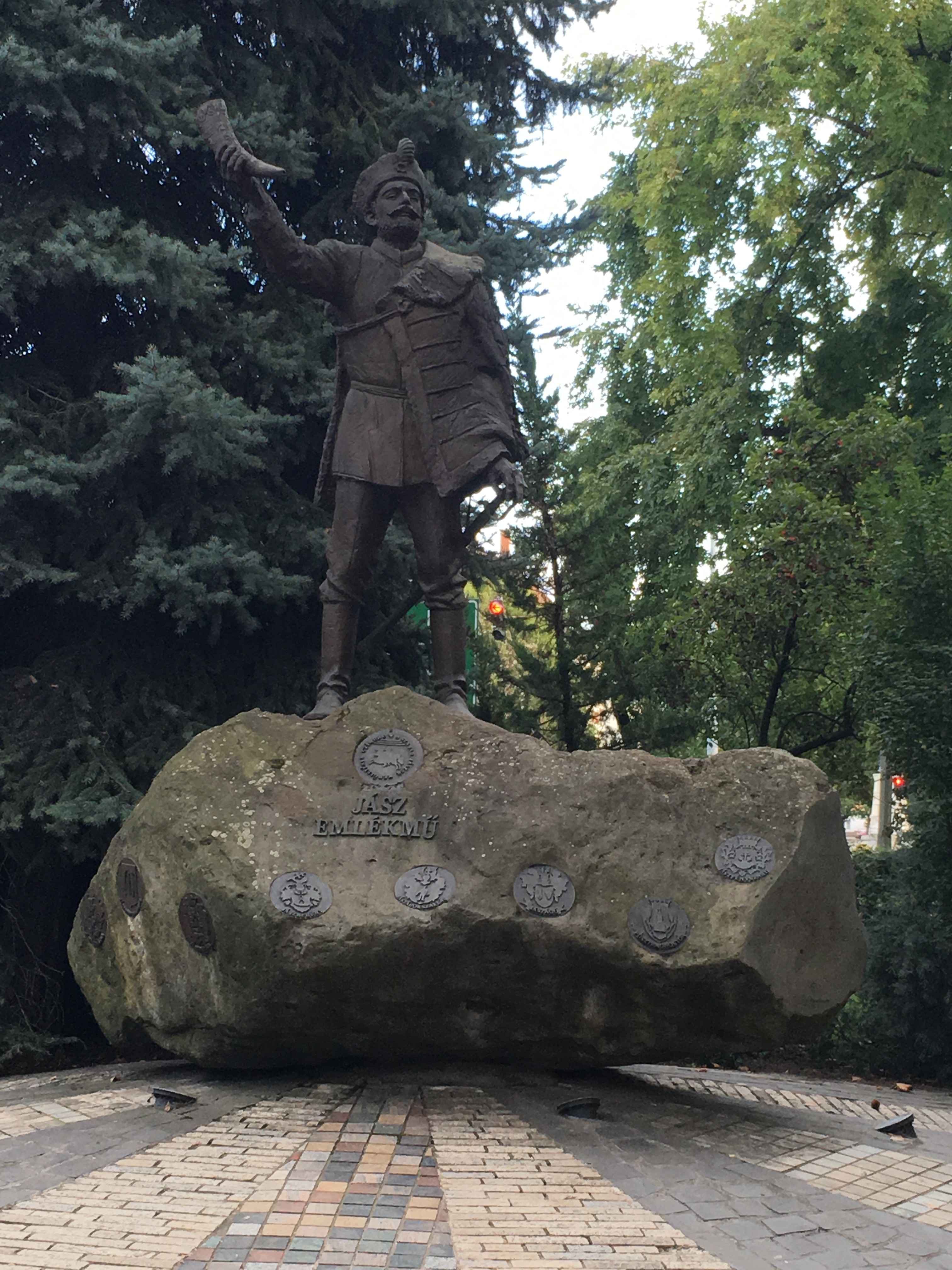 Jász emlékmű